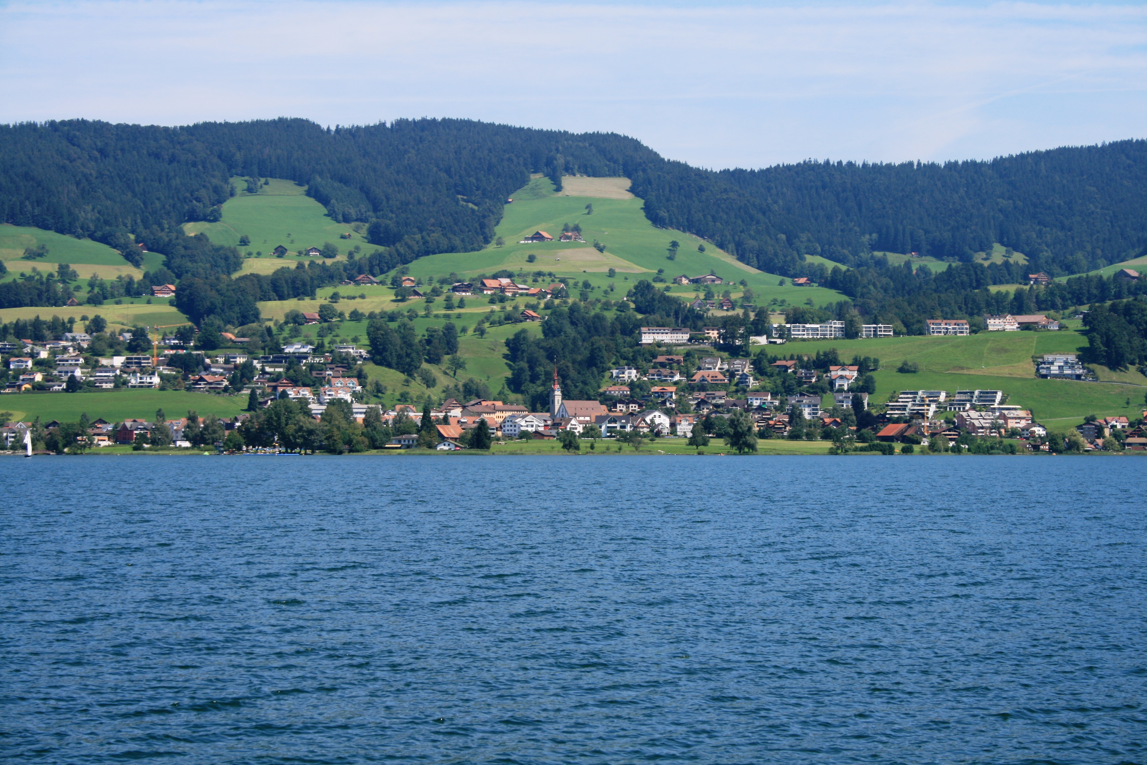 Oberägeri, Schweiz